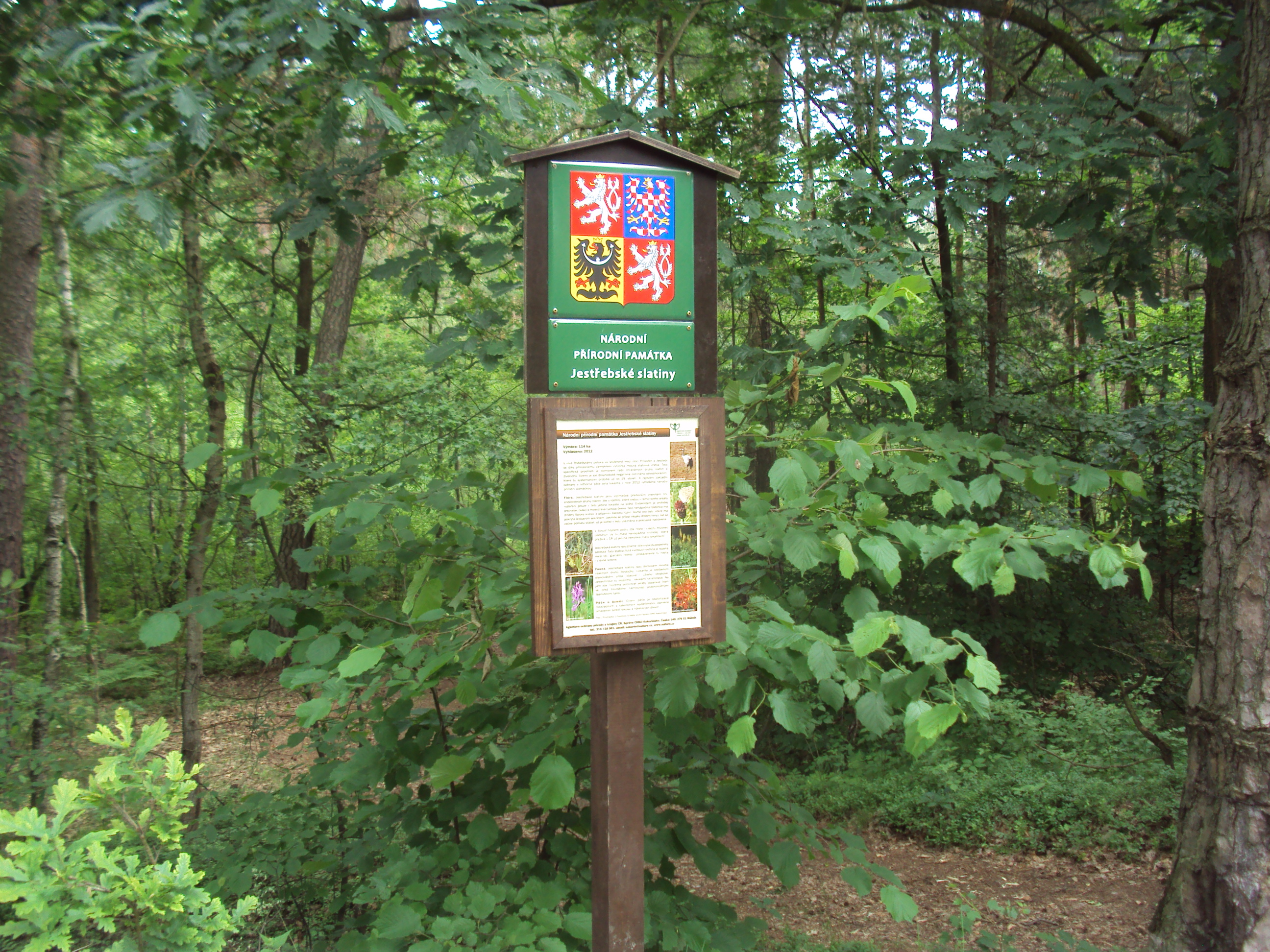 Označení počátku NPP Jestřebské slatiny